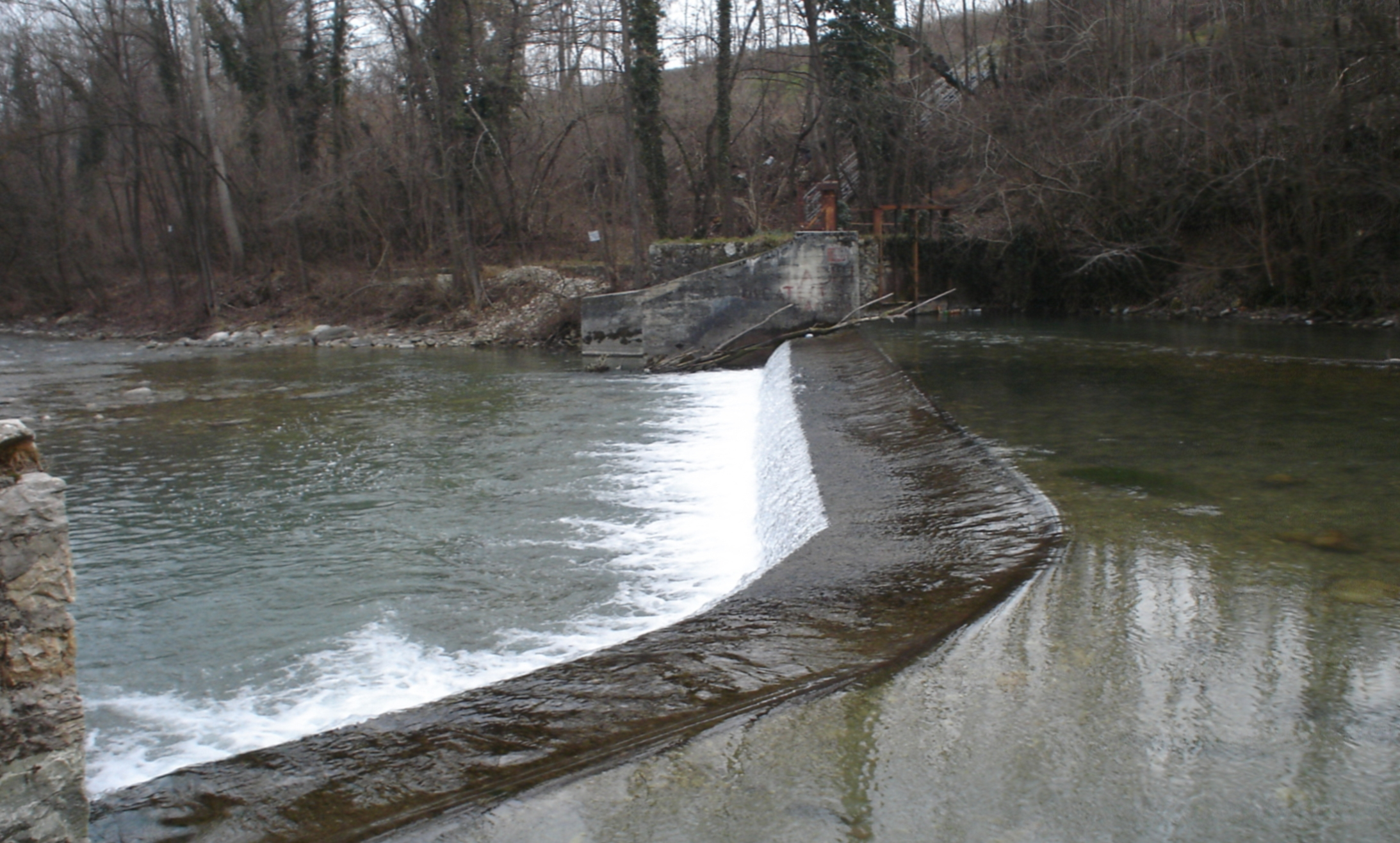 Dérivation sur la Maira avec traverse et vanne